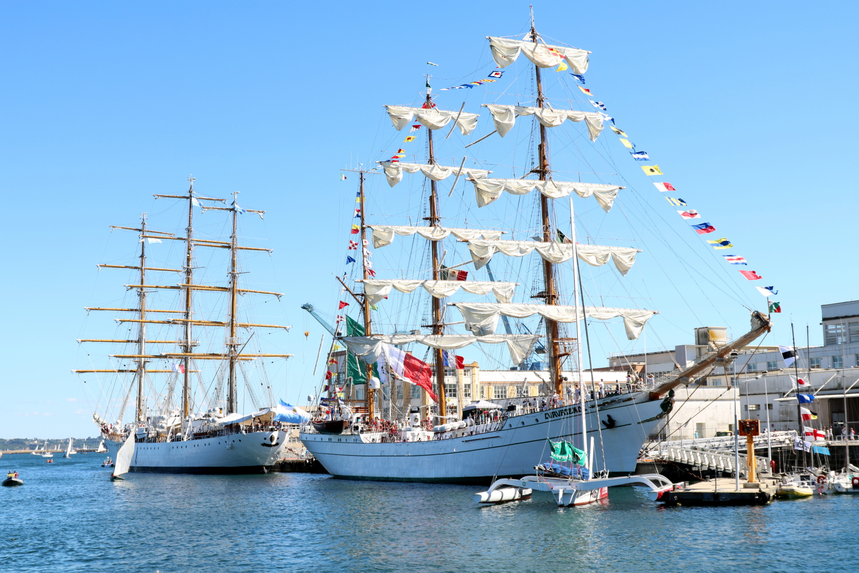 Cuauhtemoc Brest 2016